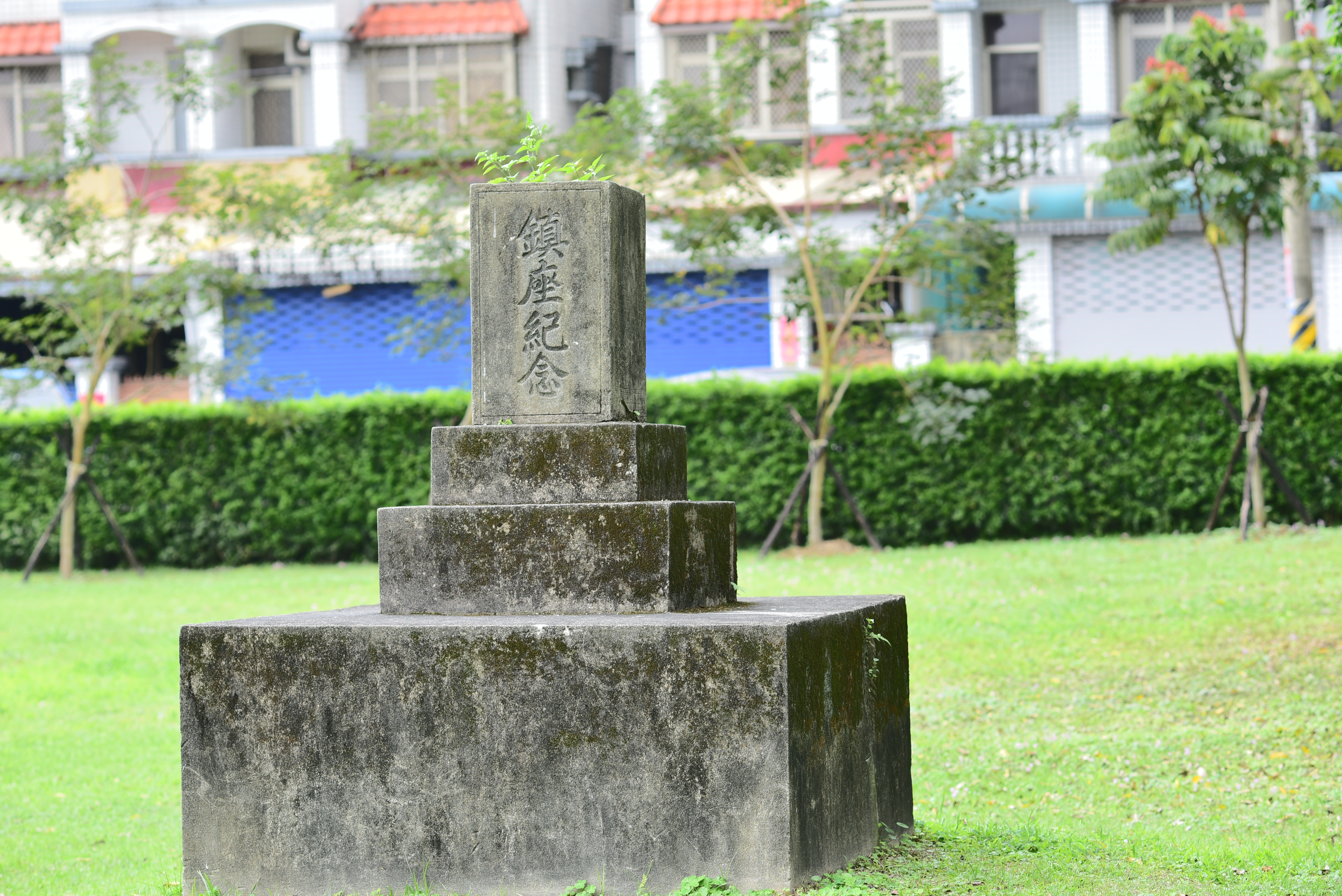 Yoshino Shrine正面鎮座紀念2018 Ji'an Township, Hualien County